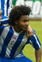 Julian de Guzman, Canadian footballer, CSKA Moscow 3-0 Deportivo de La Coruna (UEFA Cup 2nd Round)